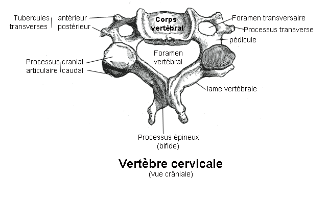 vertèbre cervicale. Anatomie humaine.